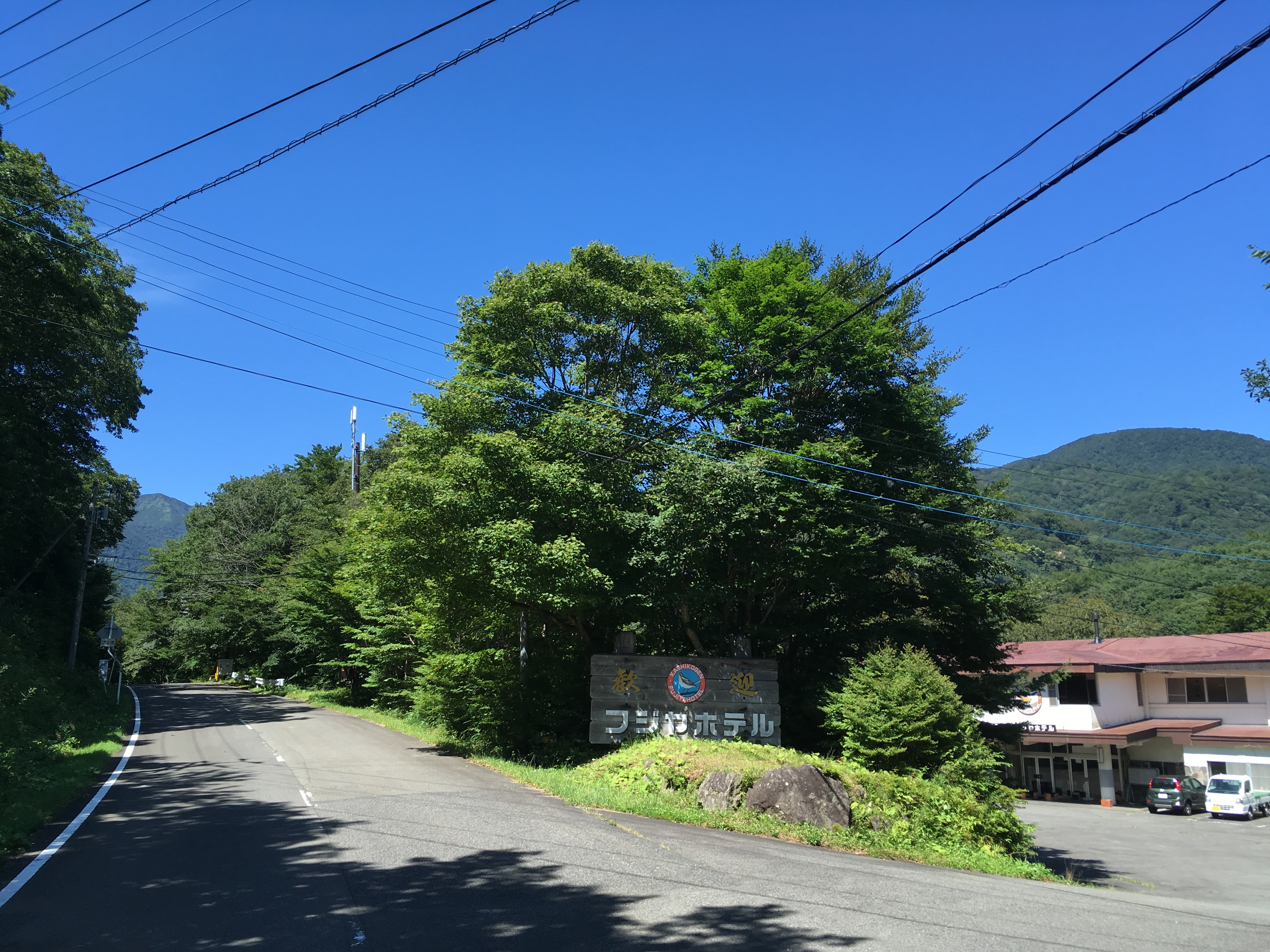 日光国立公園内阿武隈源流、標高800mの新甲子温泉最上流部に位置しています。